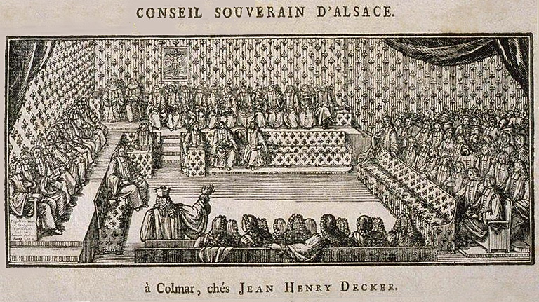 Conseil souverain d'Alsace à Colmar, chés Jean Henry Decker. 1700. Bibliothèque nationale et universitaire de Strasbourg